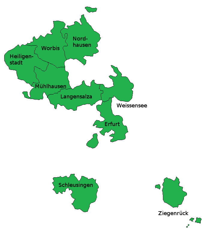 Административное деление прусского округа Эрфурт (1820)